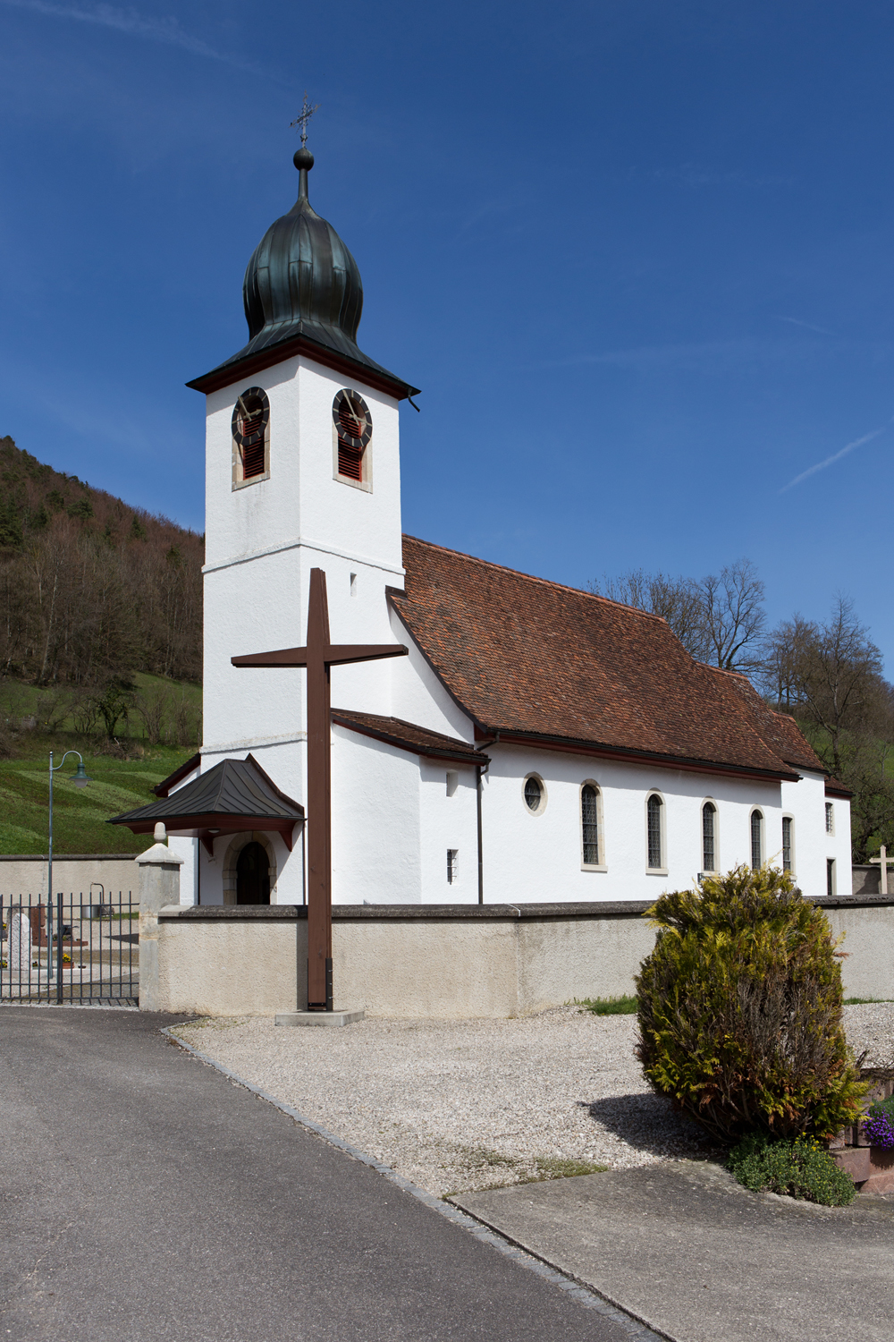 Kirche von Vermes (Val Terbi) (JU)